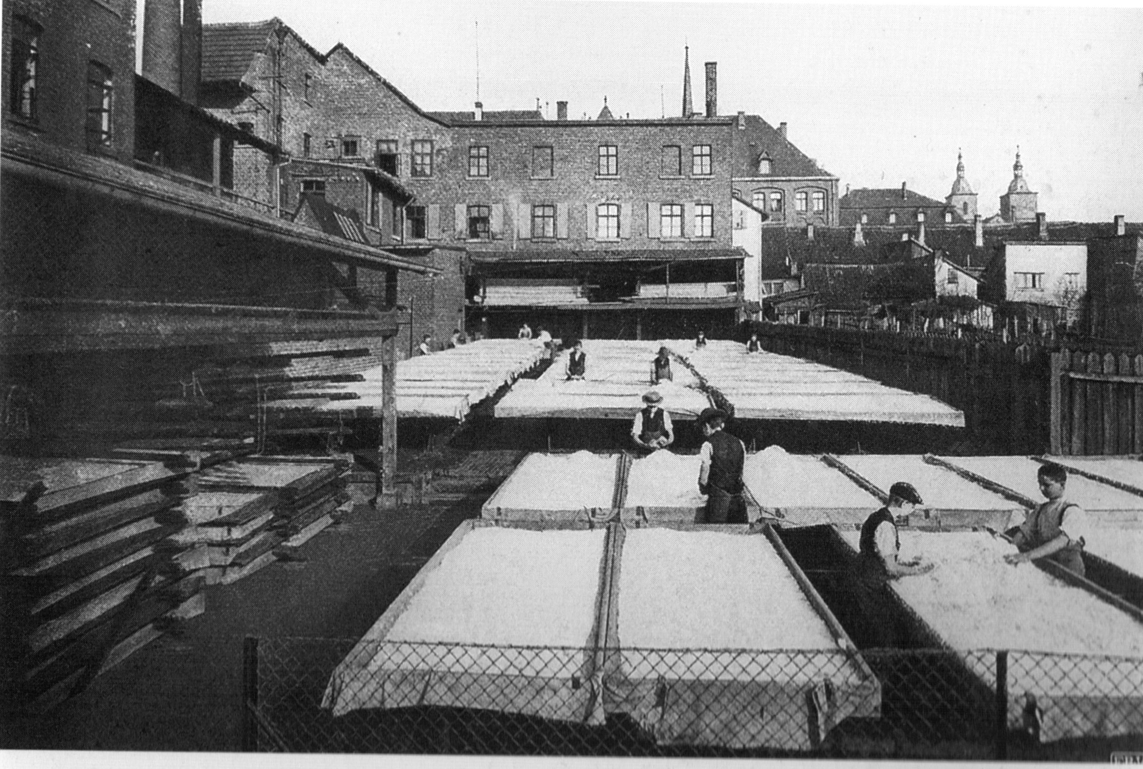 Naturwachsbleiche der wachswarenfabrik Rübsam in Fulda (Königsstrasse) um 1900